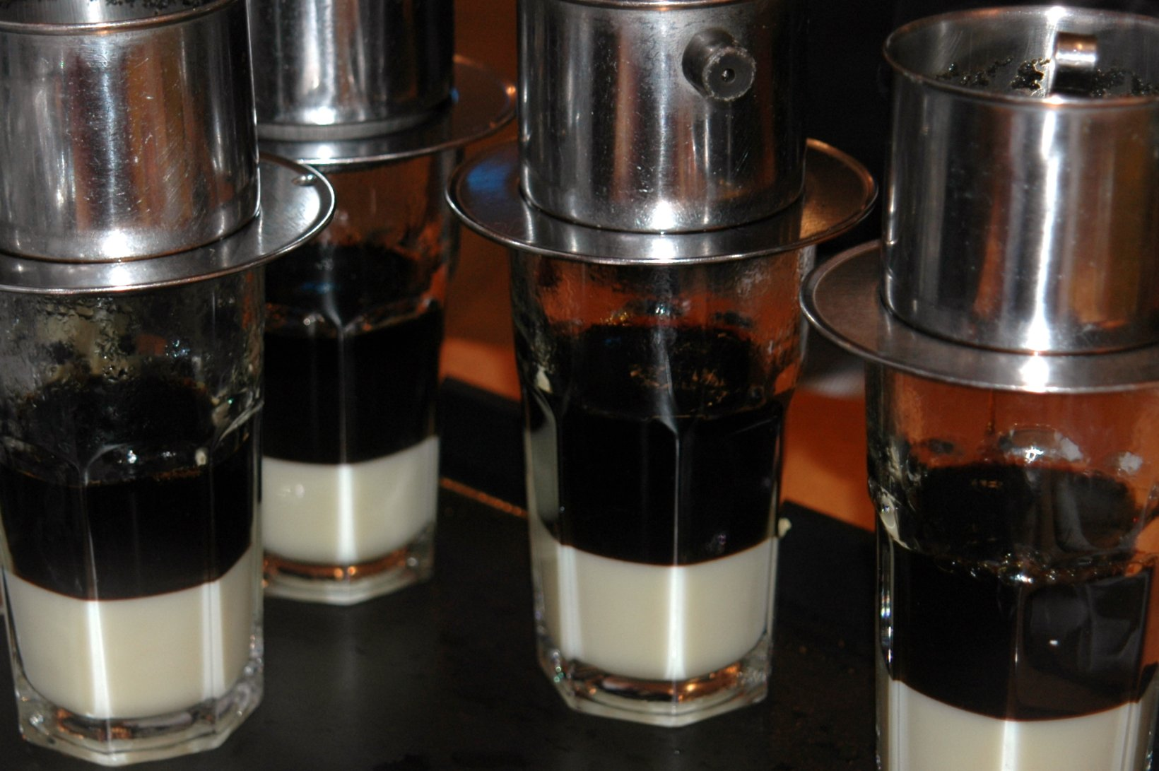 vietnamese coffees